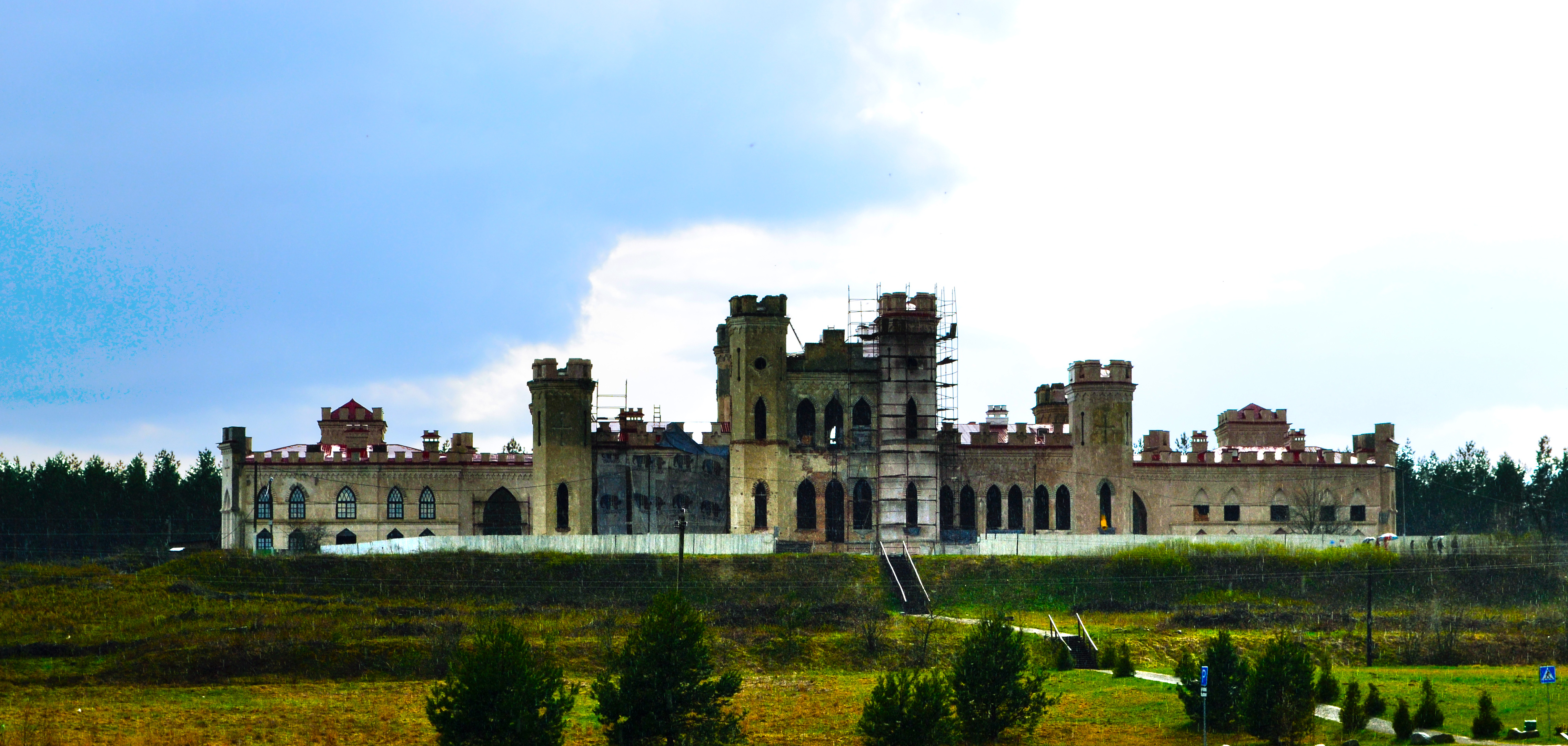 Беларуская (тарашкевіца): Палац Пуслоўскіх у Косаве. This is a photo of Belarusian heritage monument. Reference number: 111Г000305 ( WLM)